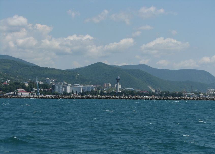 Вид на город Туапсе